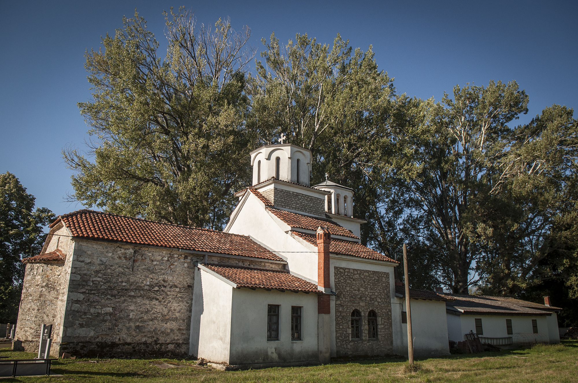 Во внатрешноста на црквата Света Богородица во Драслајца, поглед од задната страна